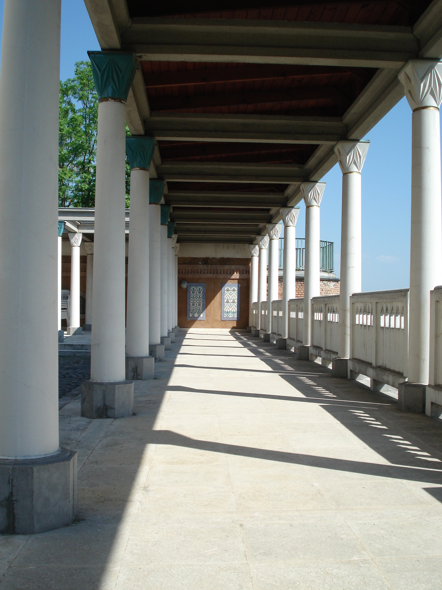 Gül Baba Türbesinden